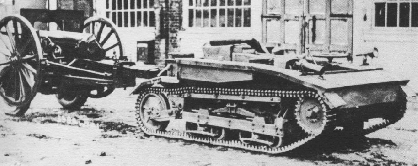 Prototyp ciągnika C2P (pierwotnie znany jako C2T) po drugiej przebudowie. [Opis oryginalny]